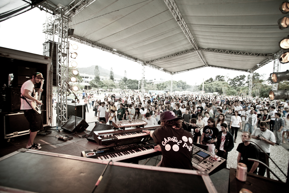 Terceiro dia do festival UFSCtock, no Campus Trindade de Universidade Federal de Santa Catarina. Apresentação da banda Skrotes.